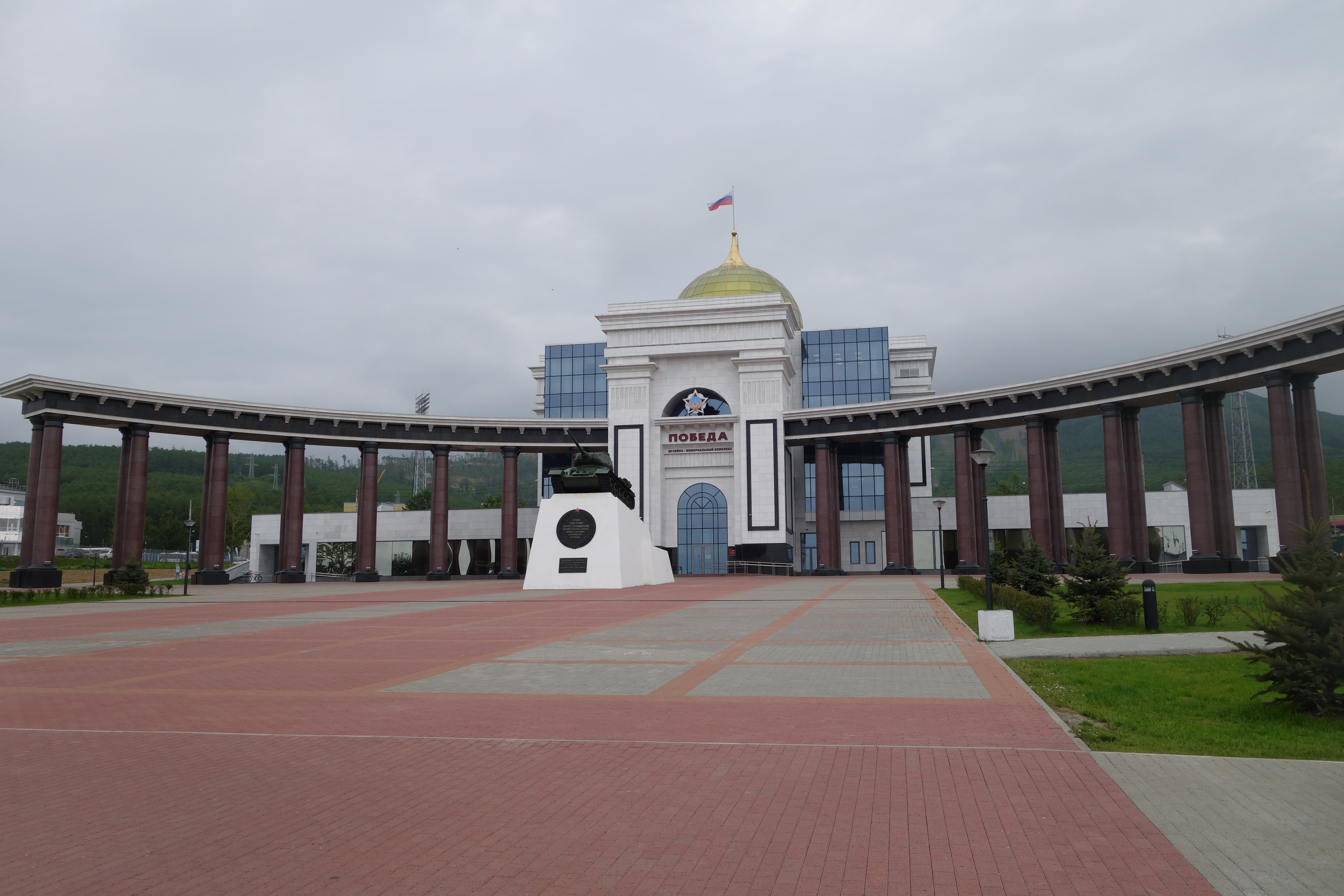 Мемориал в 2017 г.